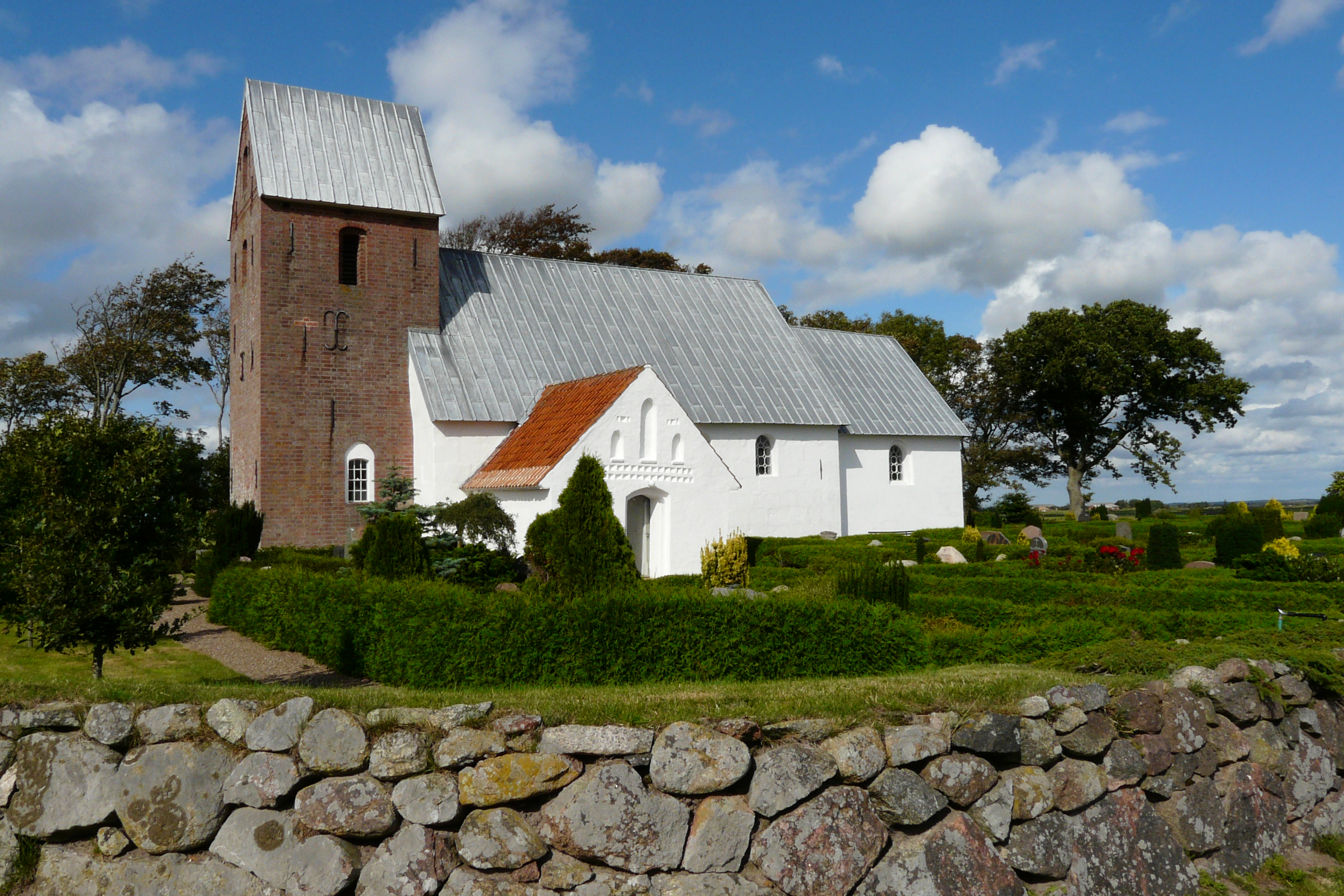 Randerup Kirke